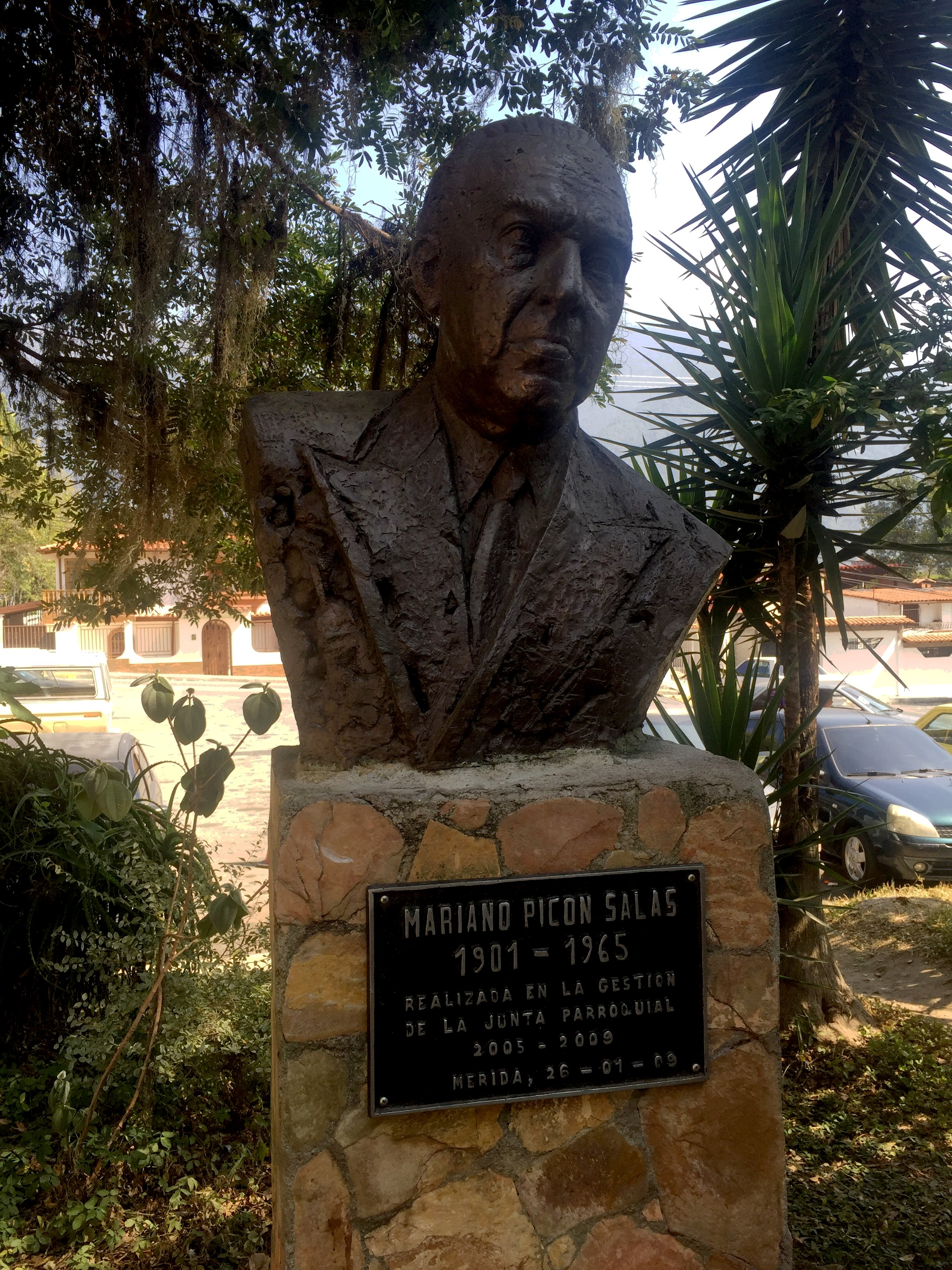 Busto de Mariano Picón Salas (1901-1965) en la ciudad de Mérida, Venezuela.